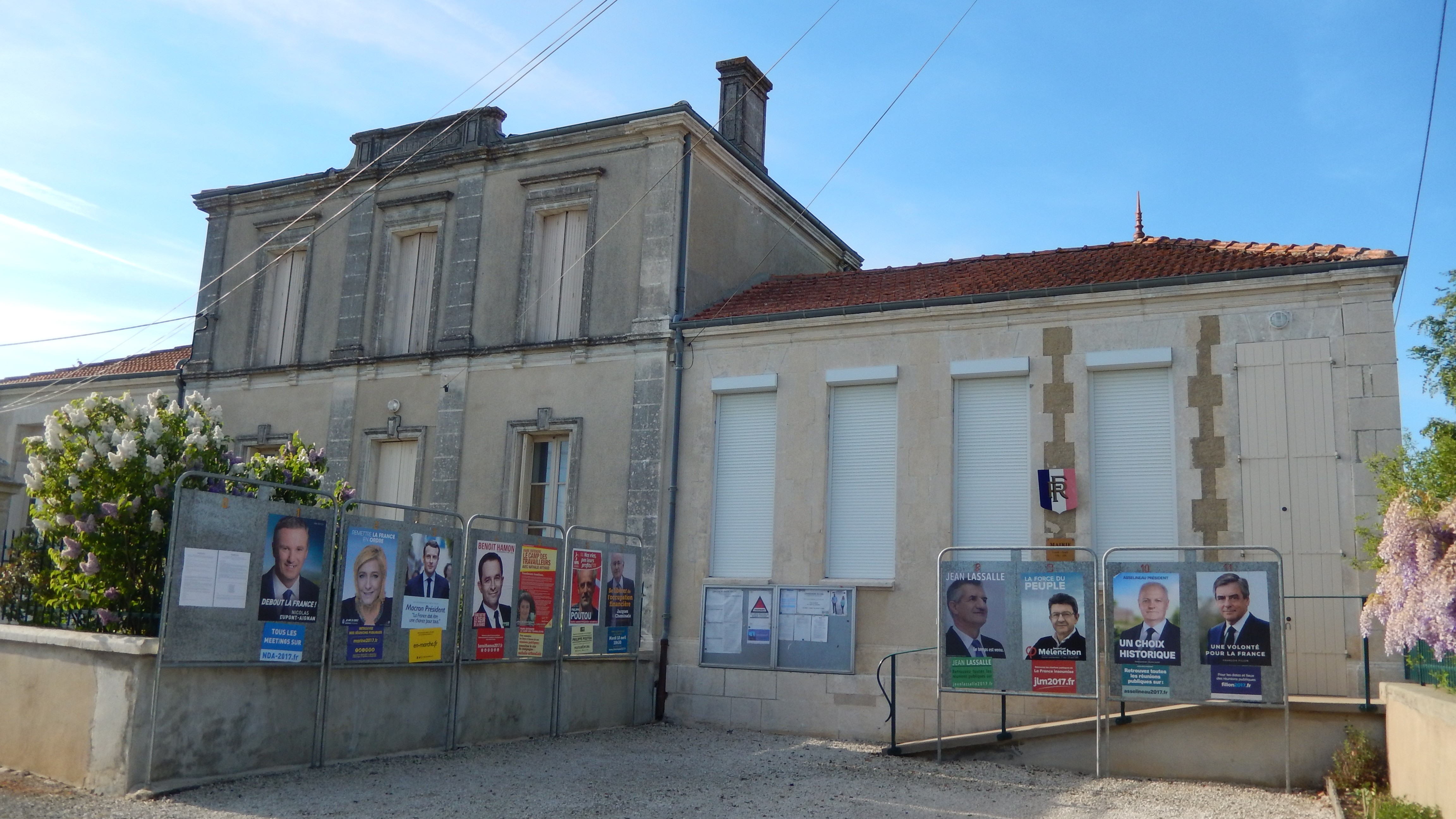 La mairie de la commune de La Croix-Comtesse (Charente-Maritime, France).